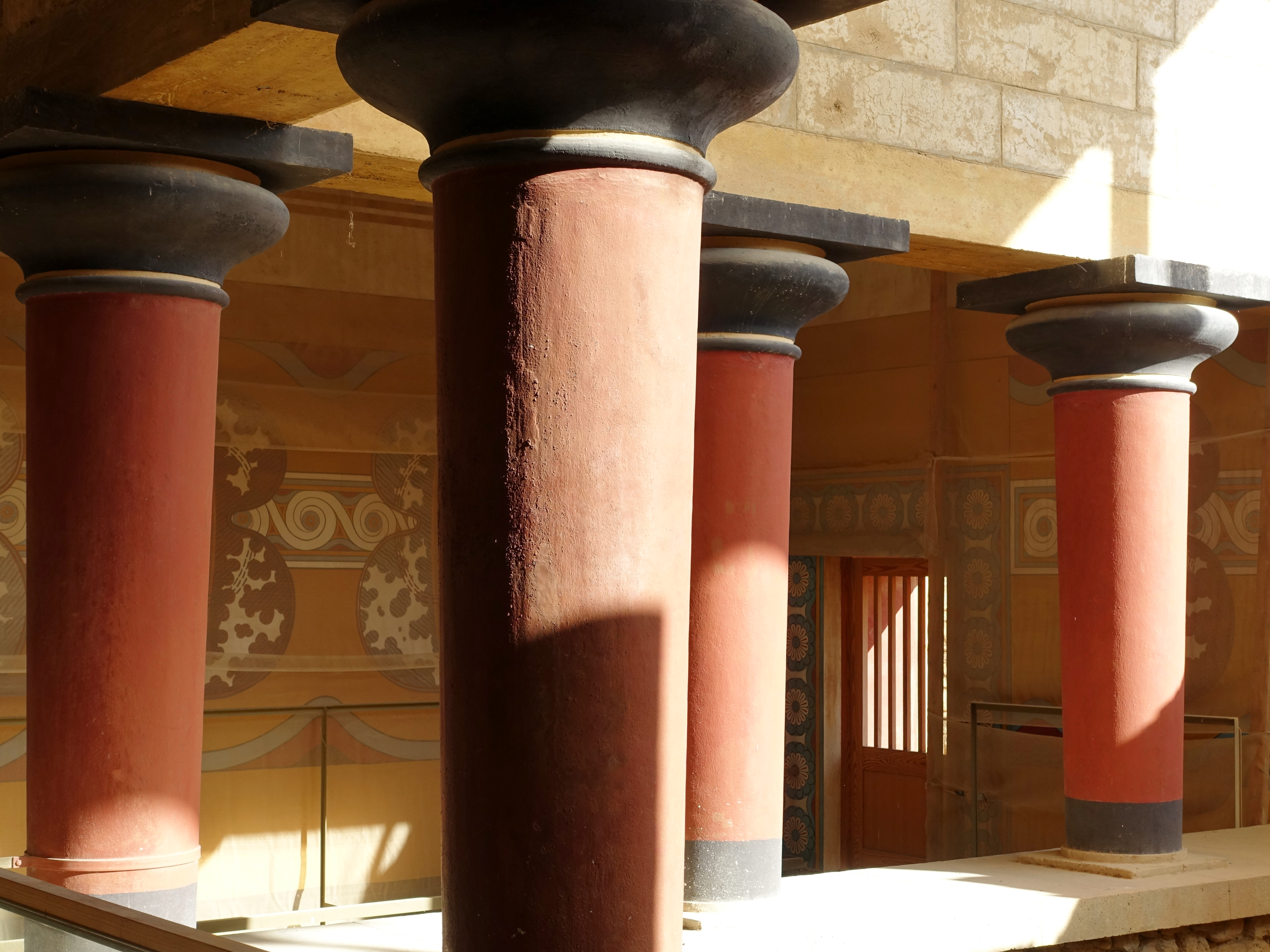 Großes Treppenhaus von Knossos (Κνωσός) südlich von Iraklio, Kreta, Griechenland